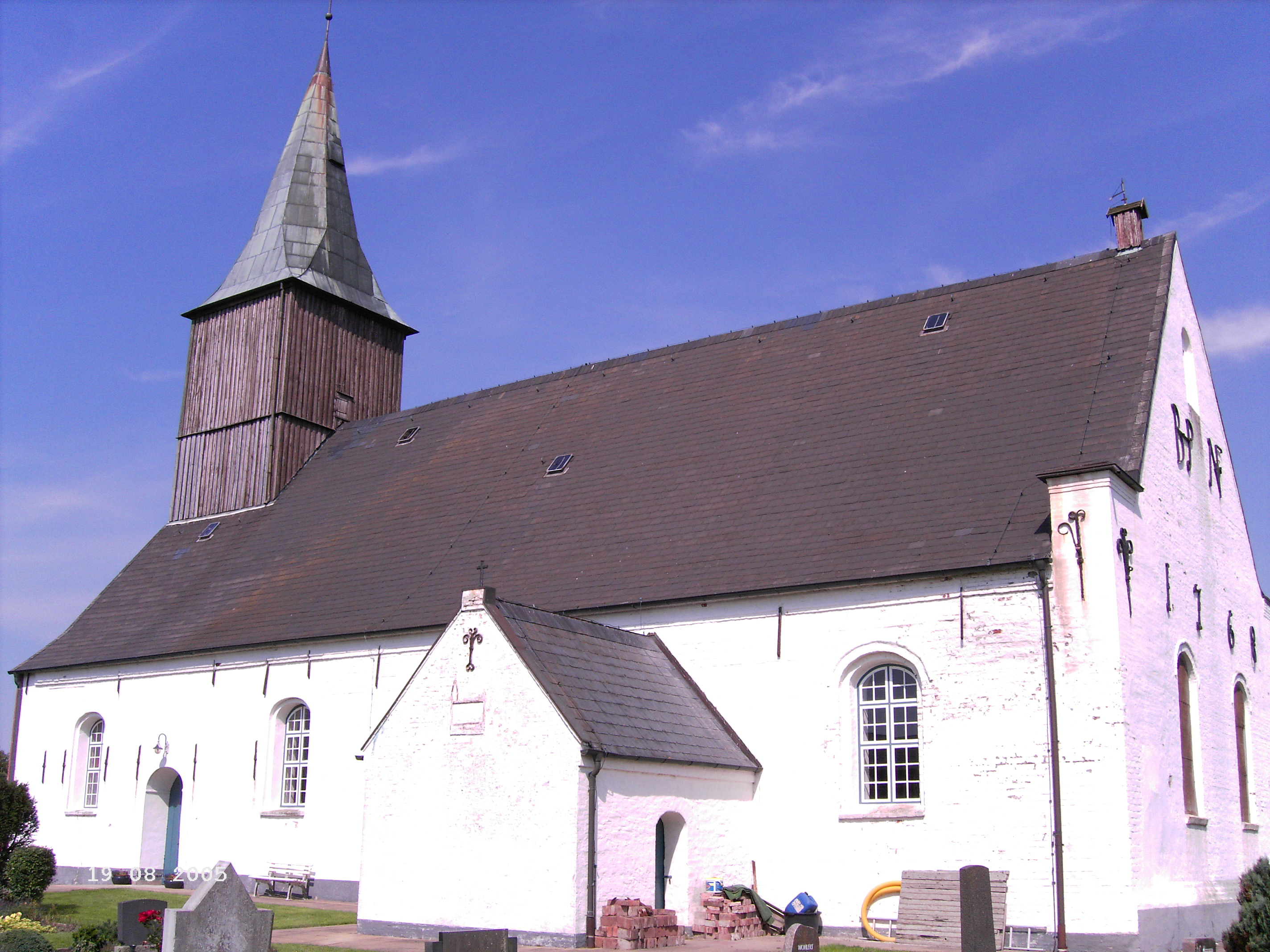 Rimberti-Kirche in Emmelsbüll, erbaut 1769